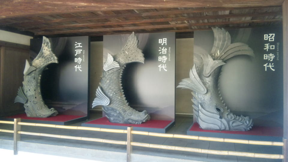 姫路城、歴代の鯱。左から、江戸時代、明治時代、昭和時代に鋳造された物。